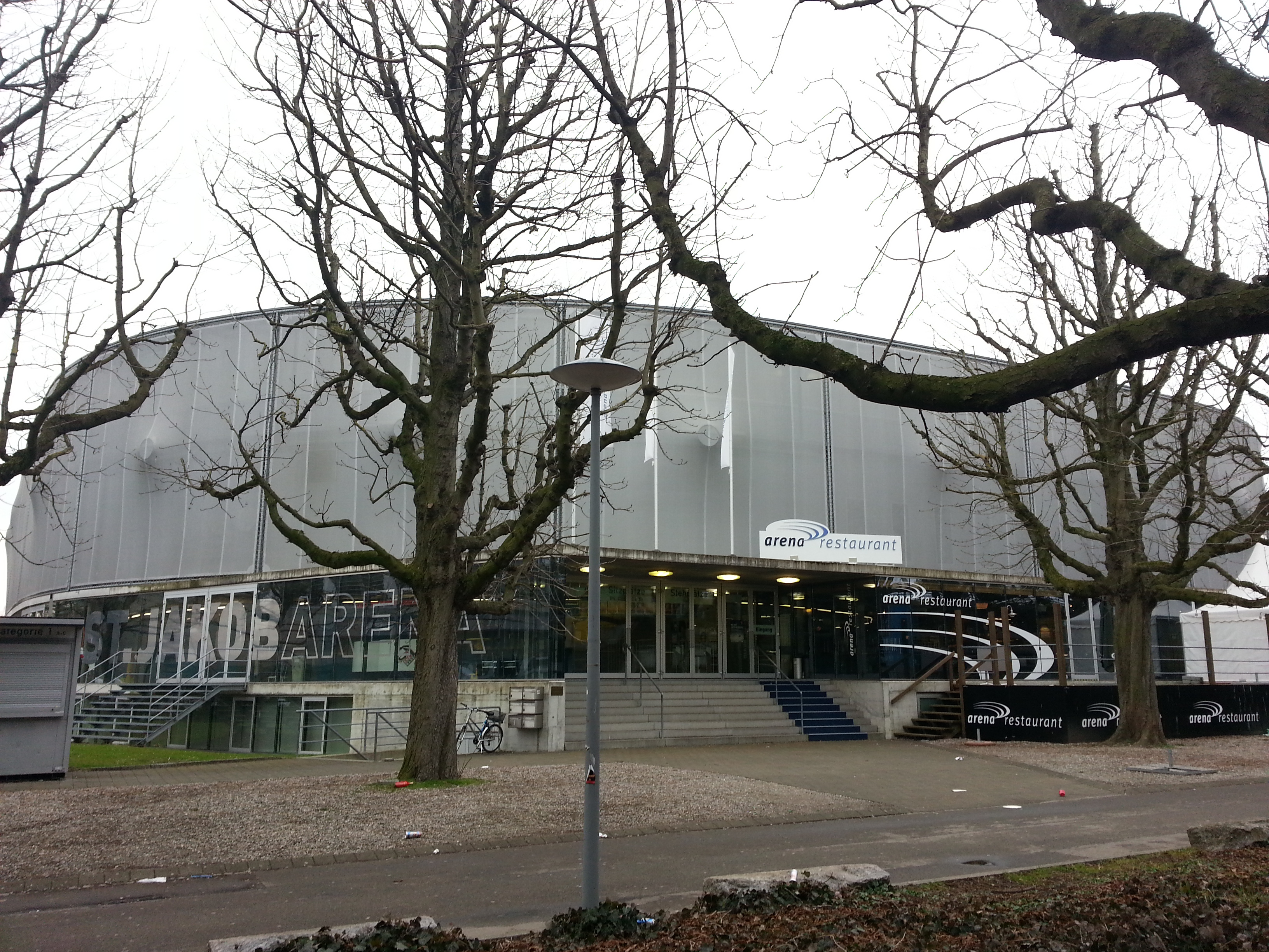 Aussenansicht der St. Jakob-Arena